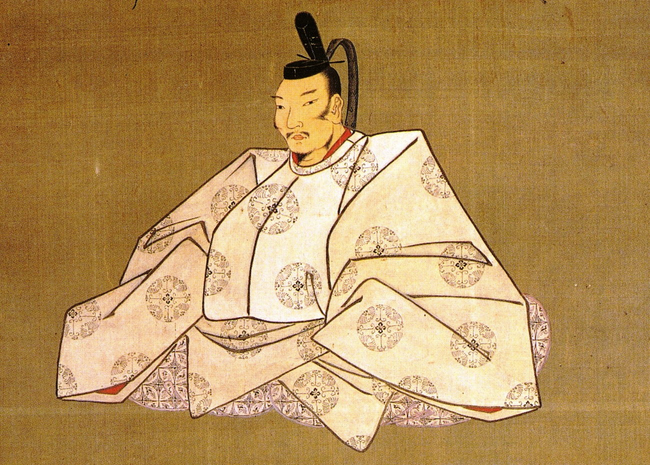 豊臣秀次(Toyotomi Hidetsugu)